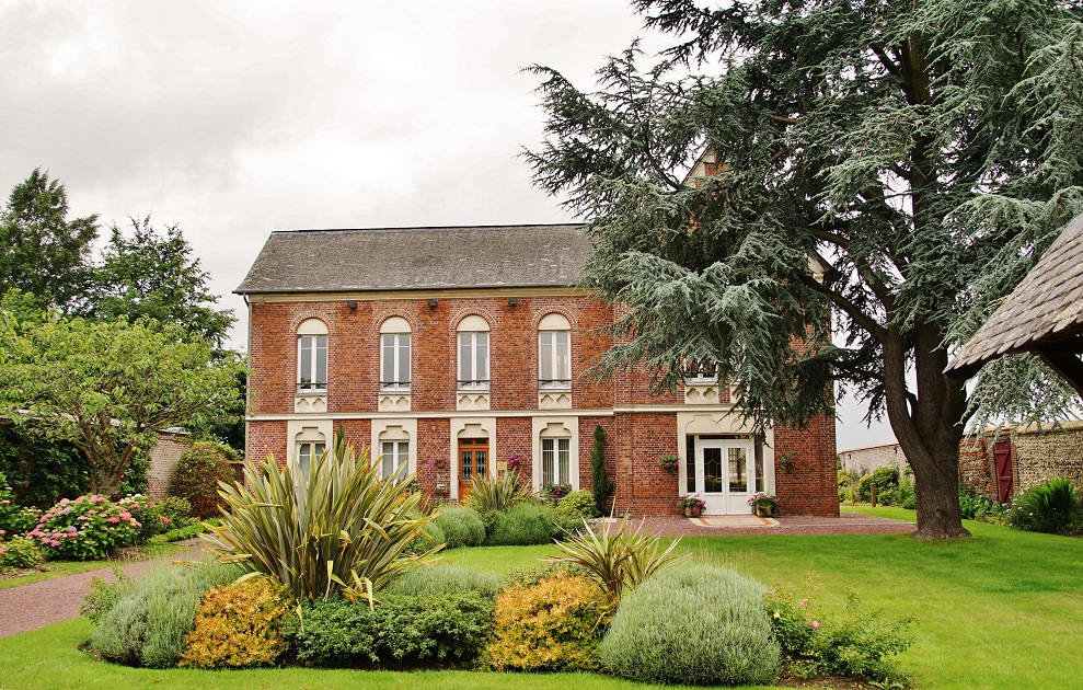 La Mairie